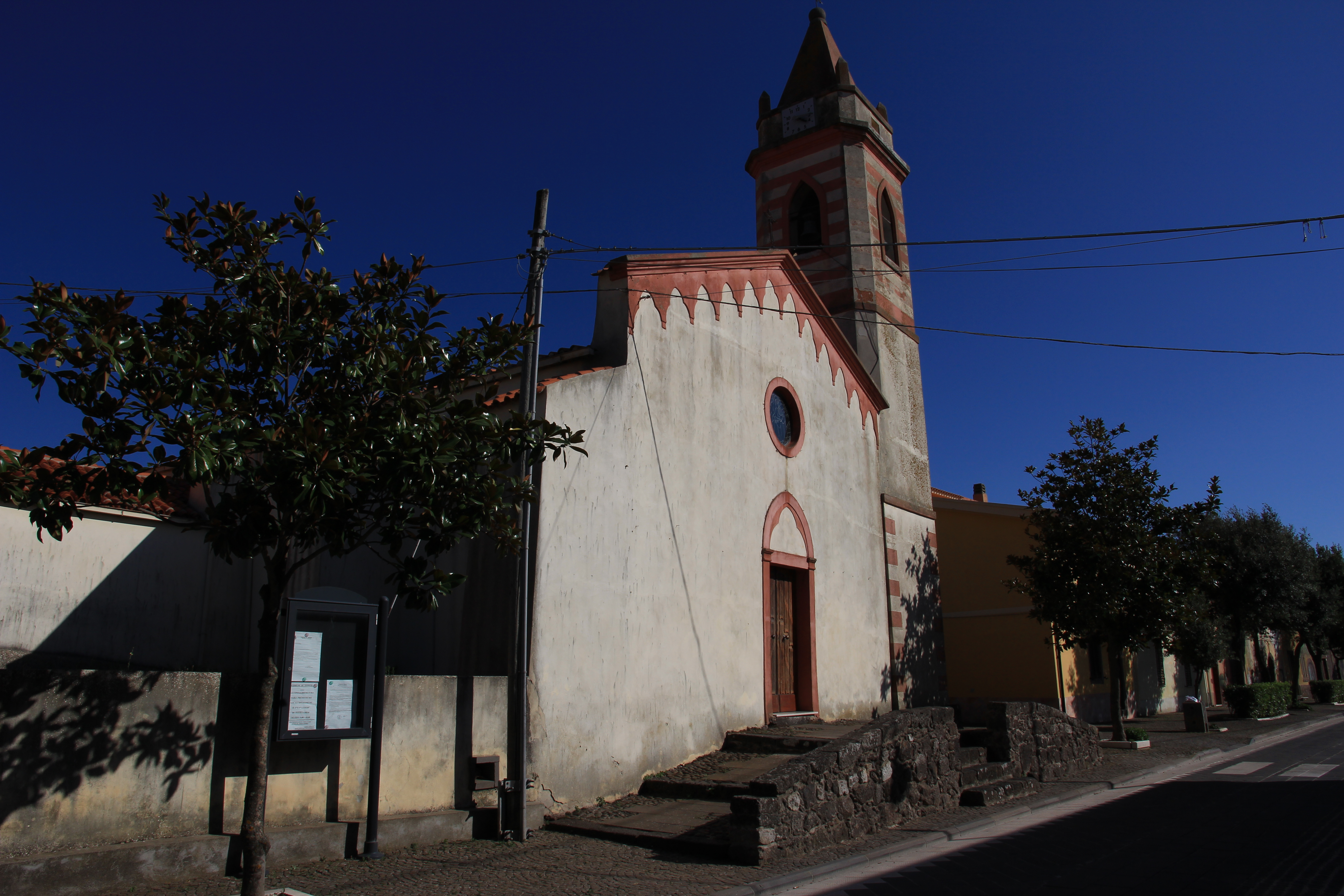 Tinnura - Chiesa di Sant'Anna